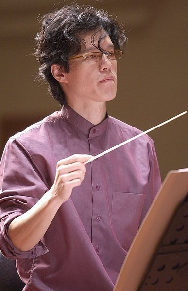 中文（台灣）: 夢響管弦樂團音樂總監暨指揮楊陳德。